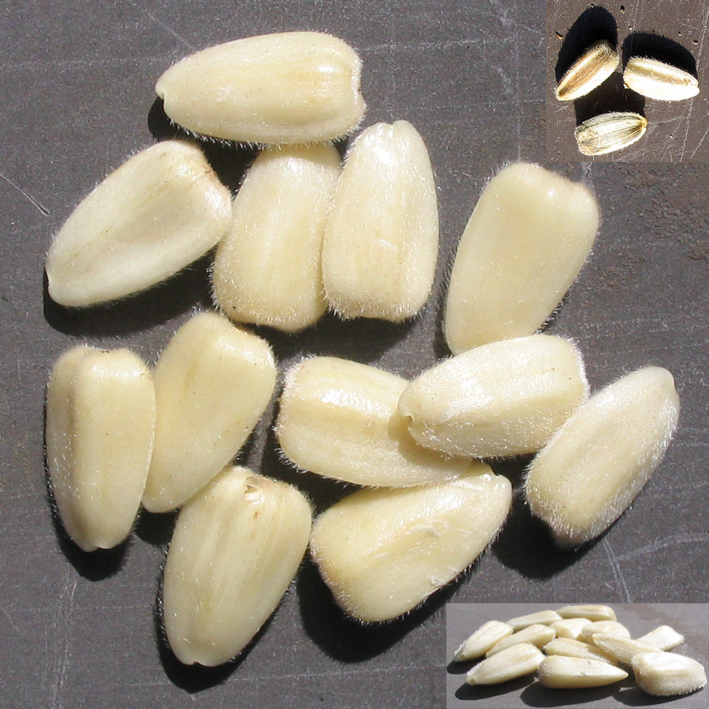 Beschreibung: Sonnenblumenkerne / sunflower seeds Fotograf: Darkone, 31. August 2004